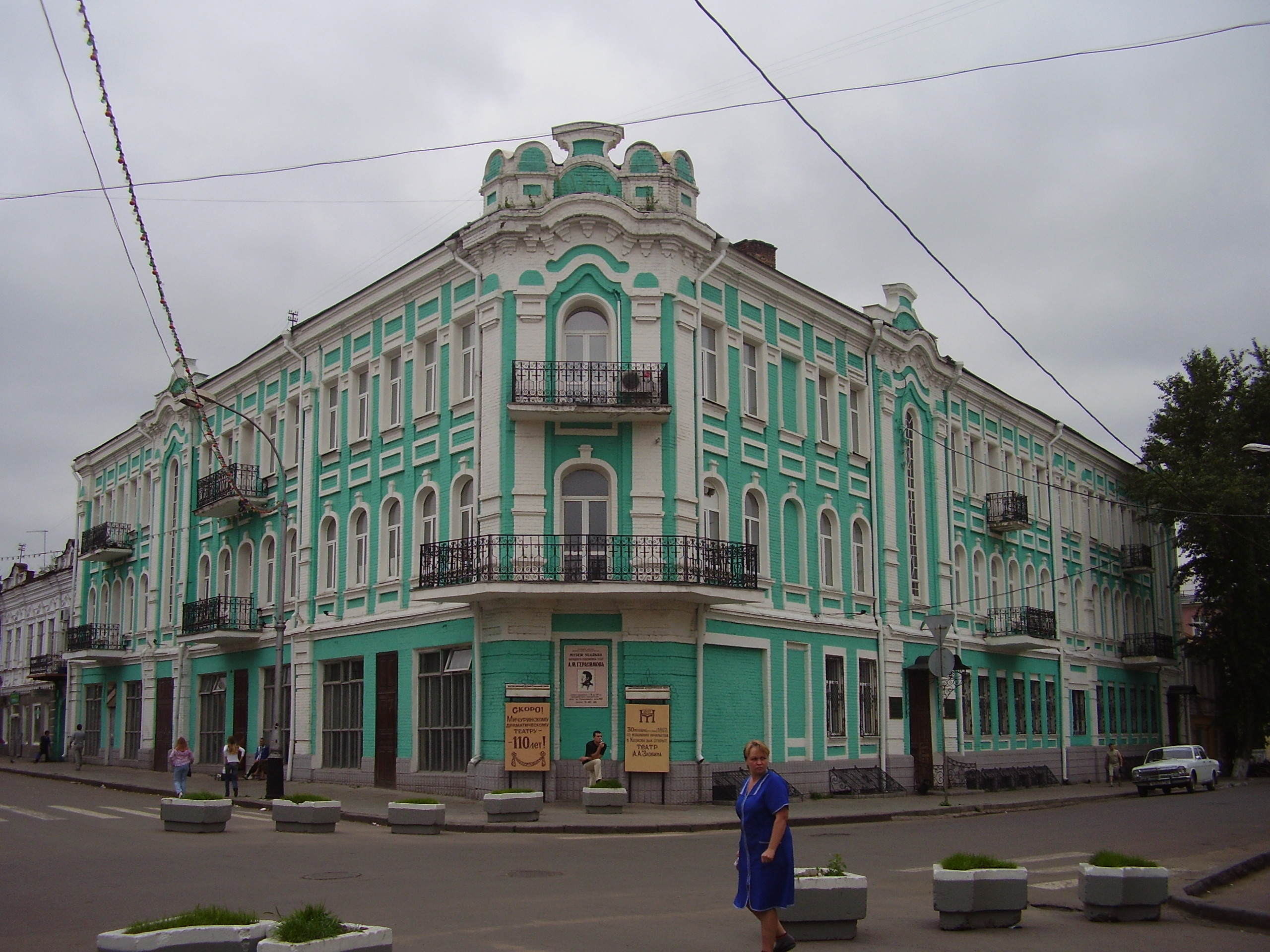 Мичуринск, педагогический институт